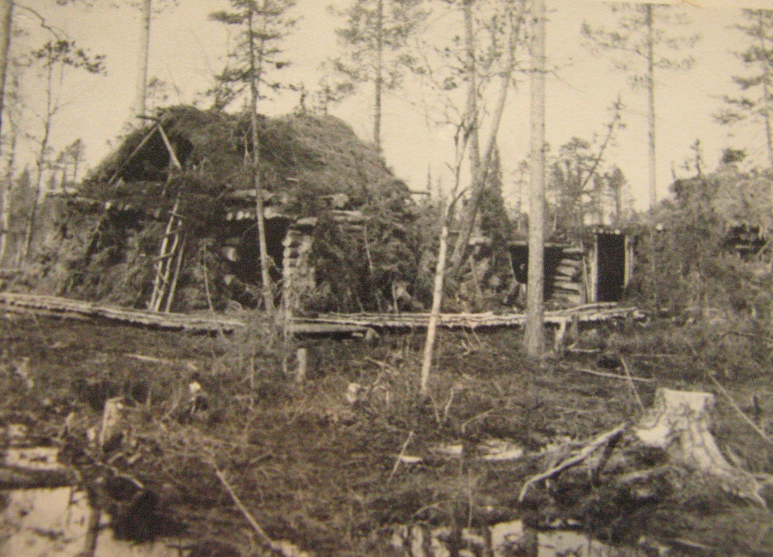 Getarnter Bunker der deutschen Wehrmacht nahe Rovaniemi (Lappland, Finnland)